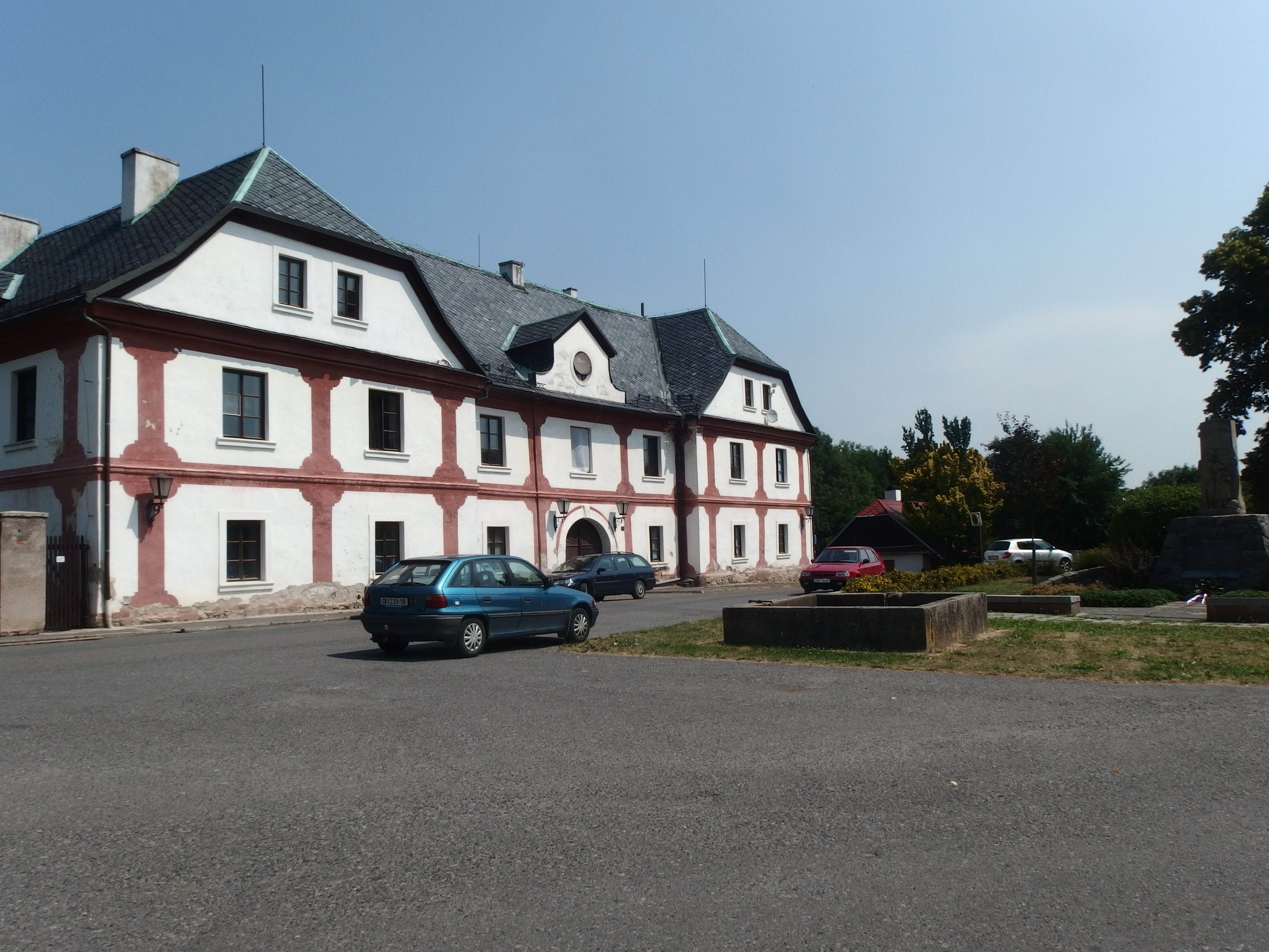 Předhradí (okres Chrudim), okres Chrudim, Česká republika. Dům čp. 35, Kpt. Svatoně 35, tzv. Panský dvůr.